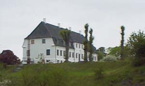 Constantinsborg efter den seneste restaurering